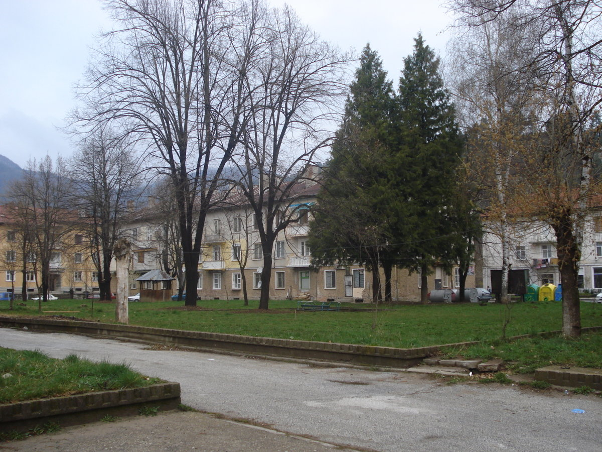 Улица Втора в Рудозем.